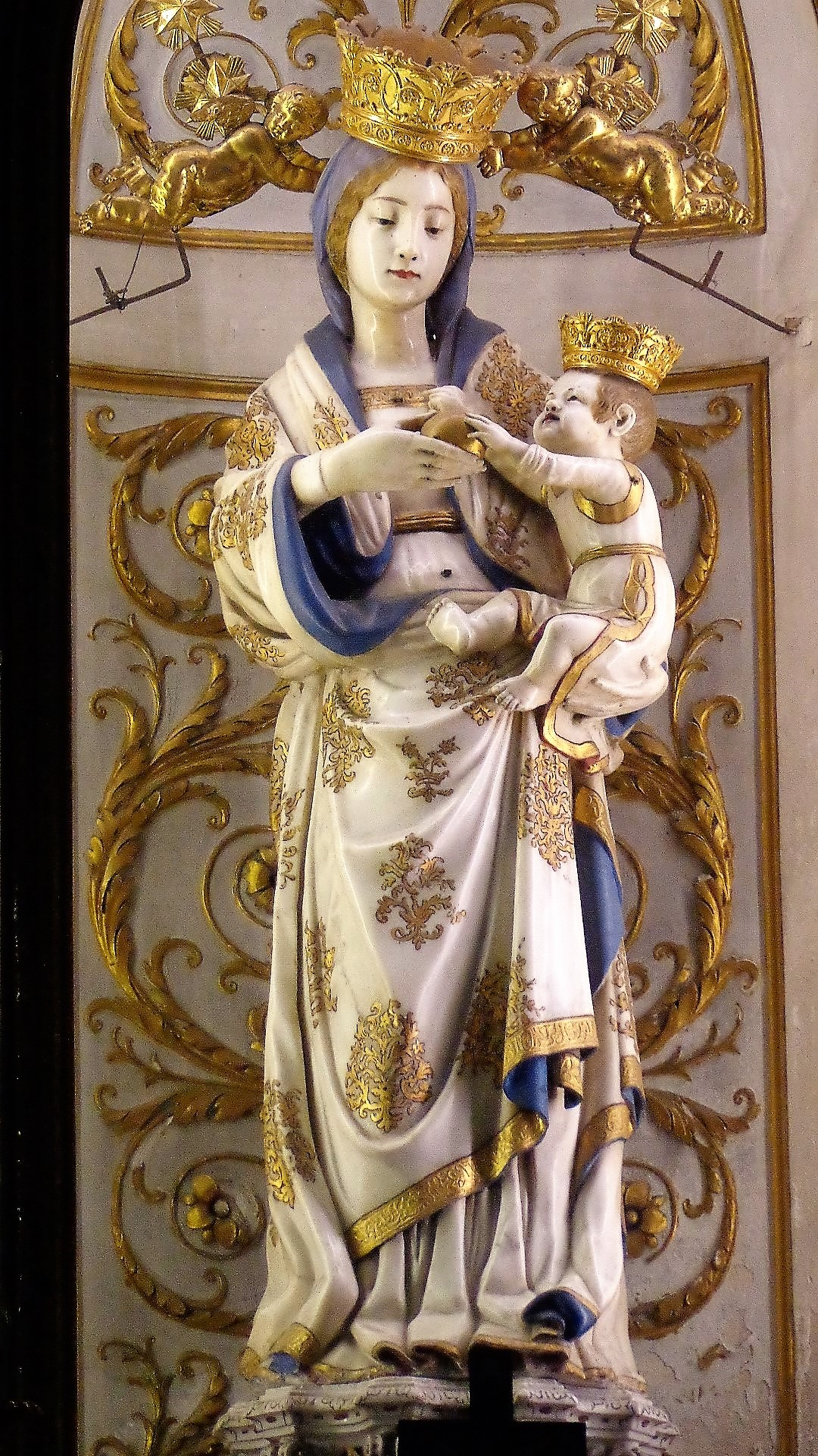 Statua Marmorea Madonna Libera Inferni